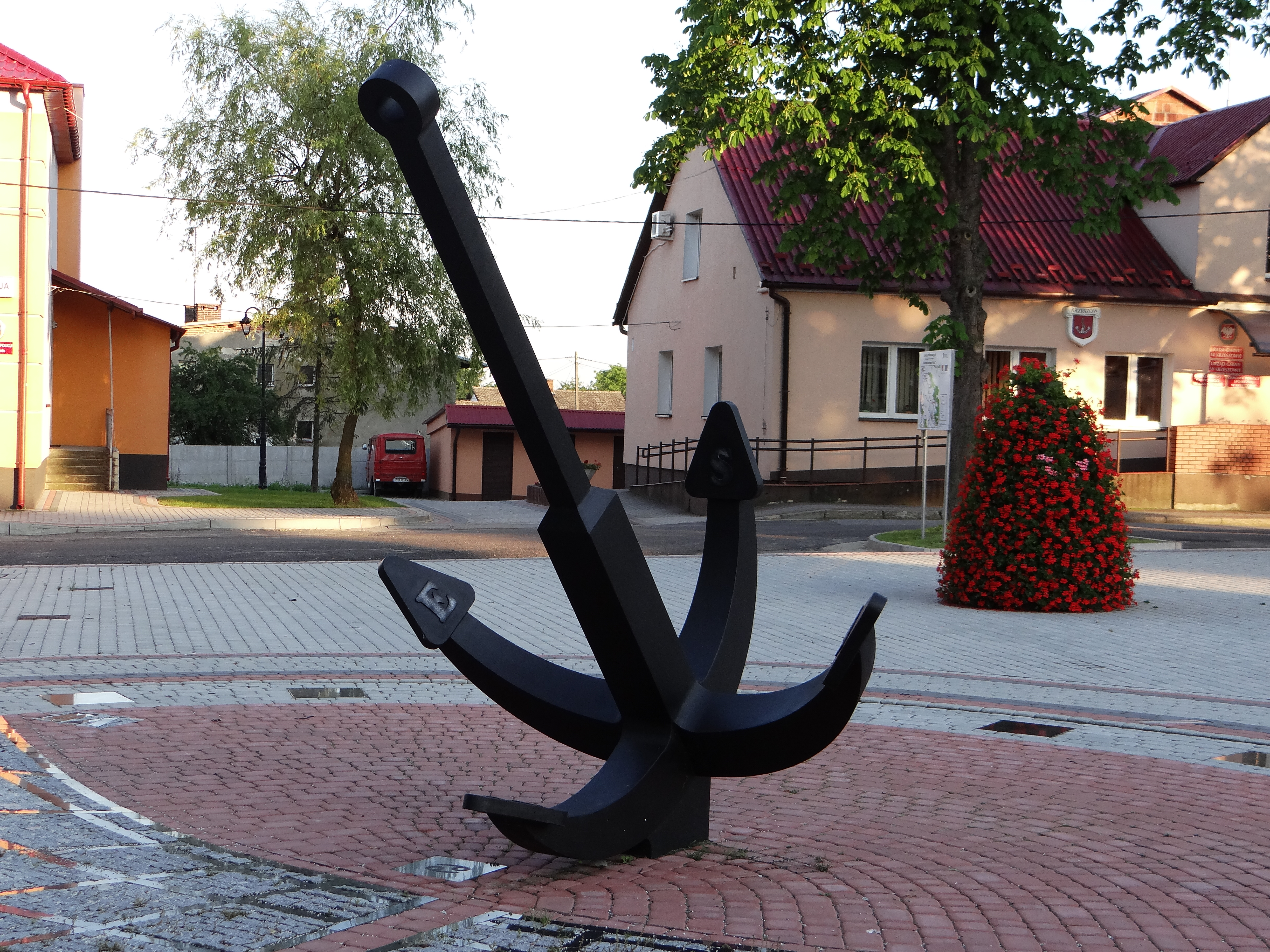 Zdjęcie wykonane w miejscowości Krzeszów, powiat niżański.